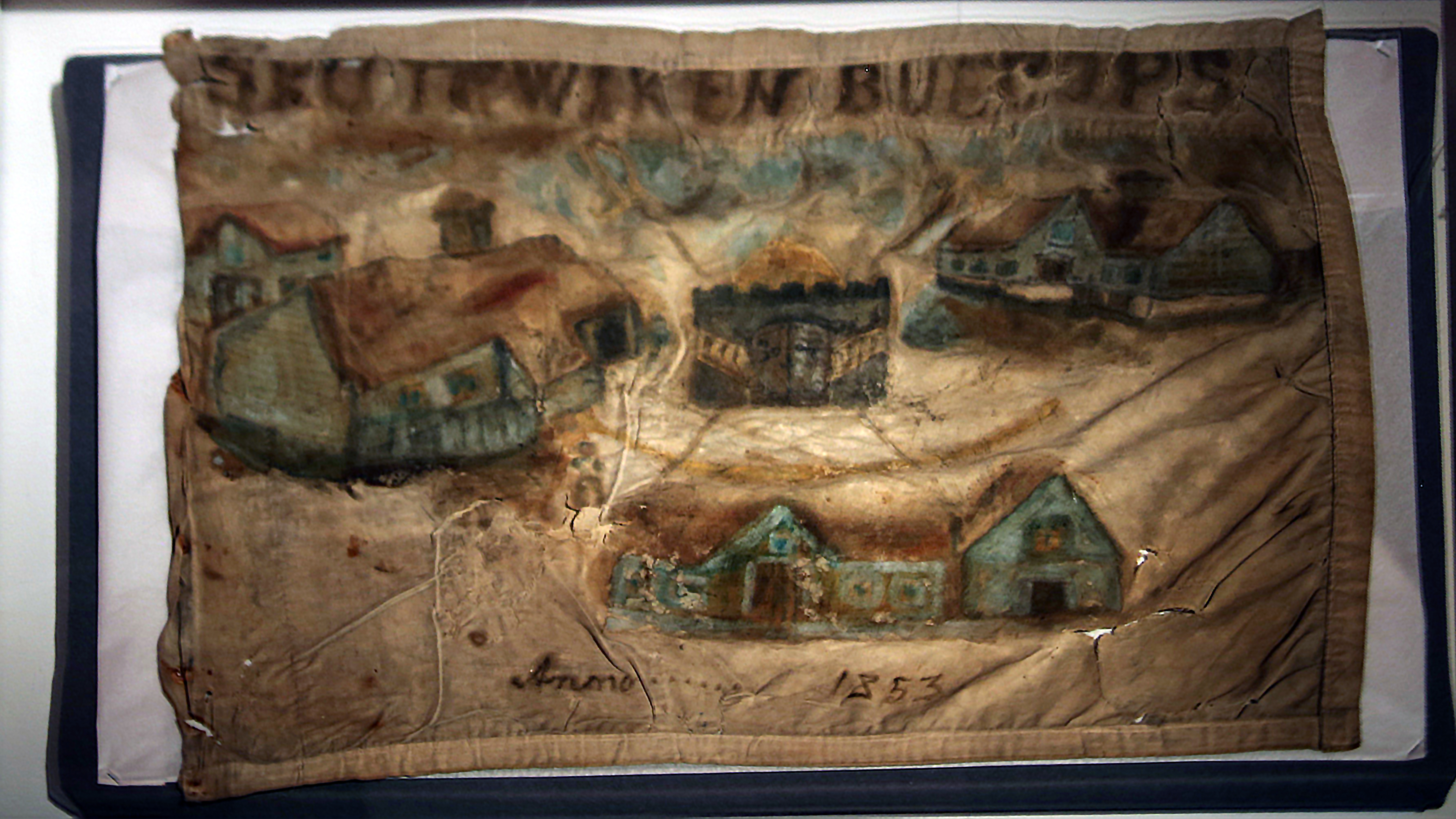 Fane Skutevikens buekorps